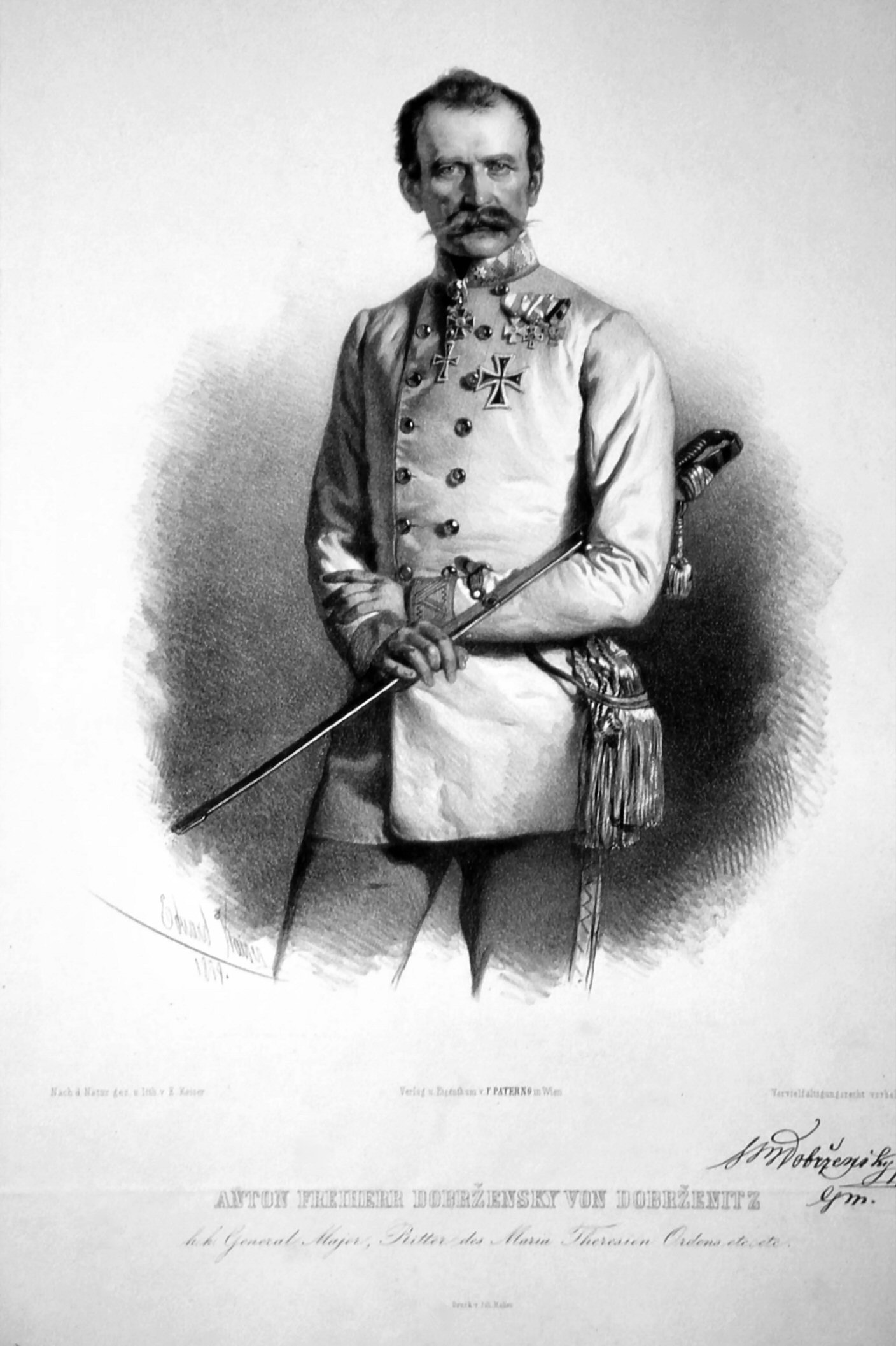 Anton Dobržensky von Dobrženitz (1807-1869), Freiherr, Generalmajor, Ritter des militärischen Maria-Theresien-Ordens.Lithographie von Eduard Kaiser, 1859